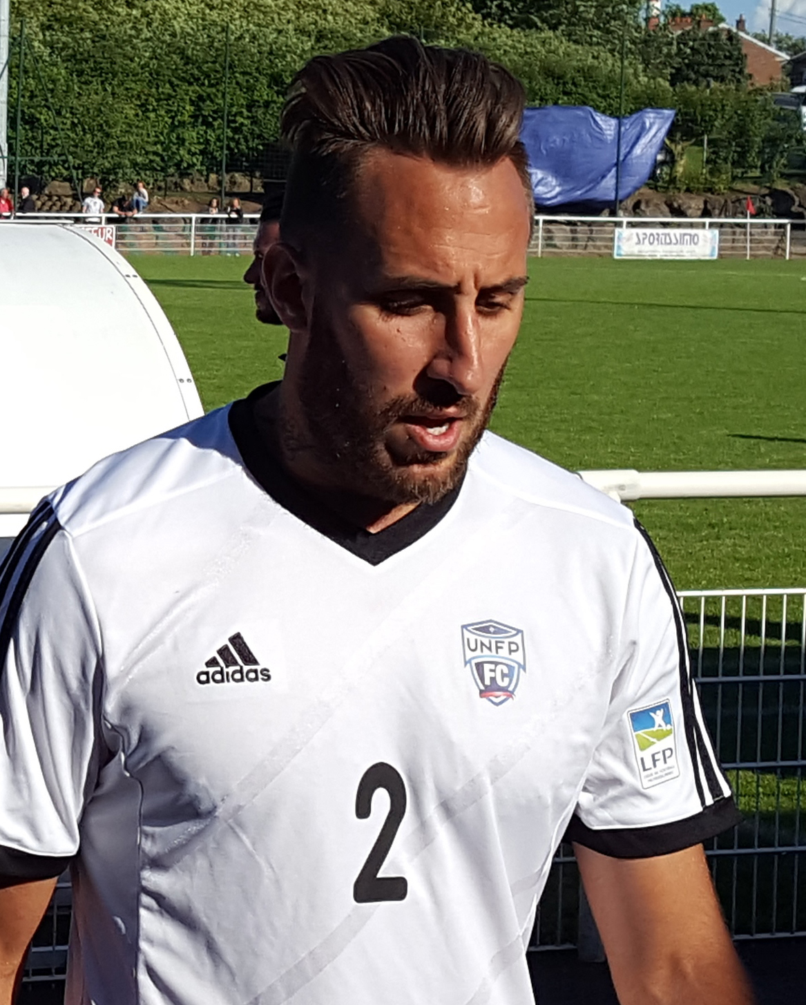 Romuald Marie lors du match amical Valenciennes / UNFP FC, le 2 juillet 2016, au Stade des Navarres à Aniche.